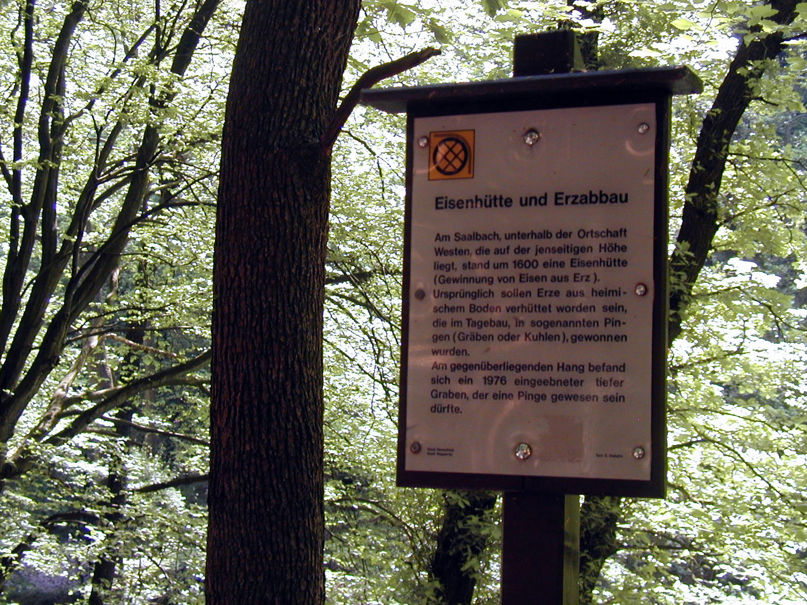 Hinweisschild am Saalbach (Wuppertal), 2001 selbst fotografiert